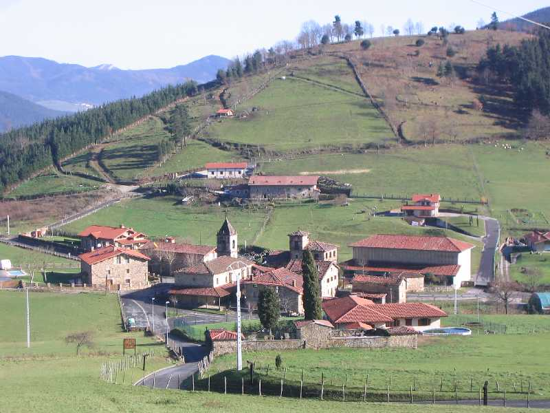 Vista del barrio de Axpe en Achondo en Vizcaya, País Vaco, España.